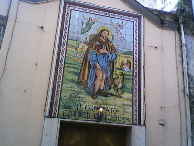 Vista della facciata della cappella di S. Rocco di Nocera Inferiore (SA)